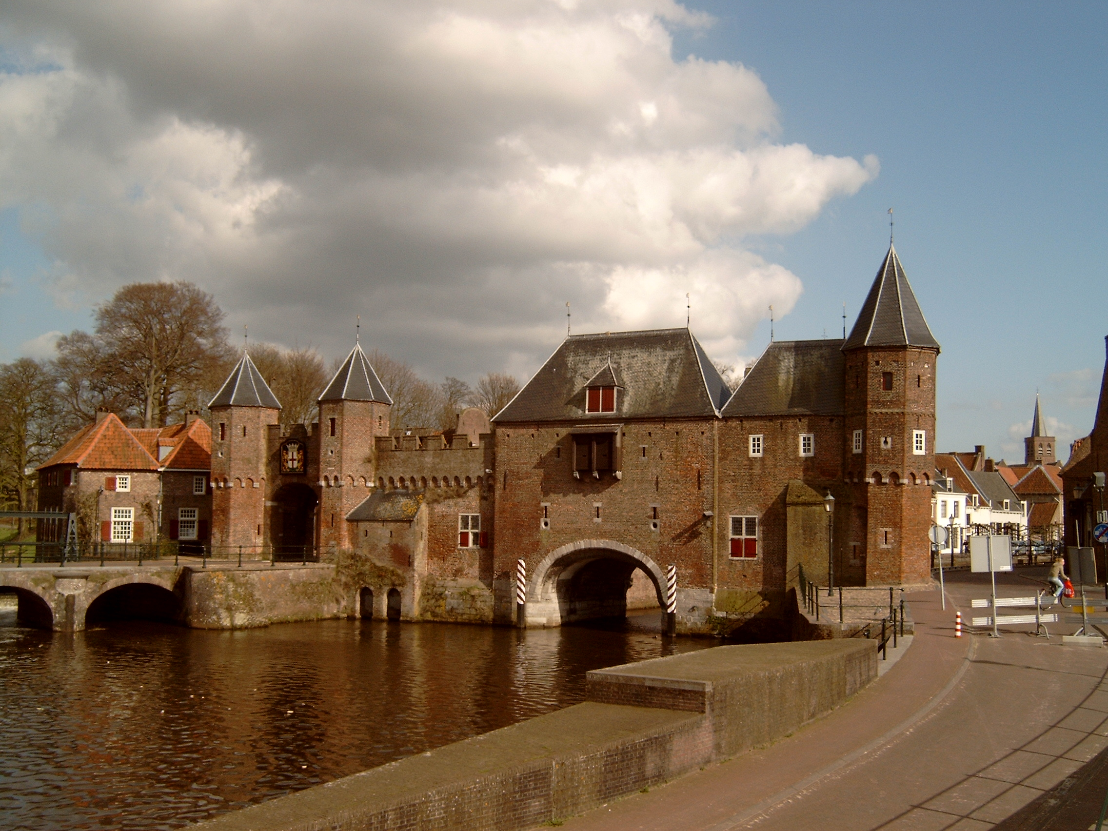 Amersfoort, oude stadspoort